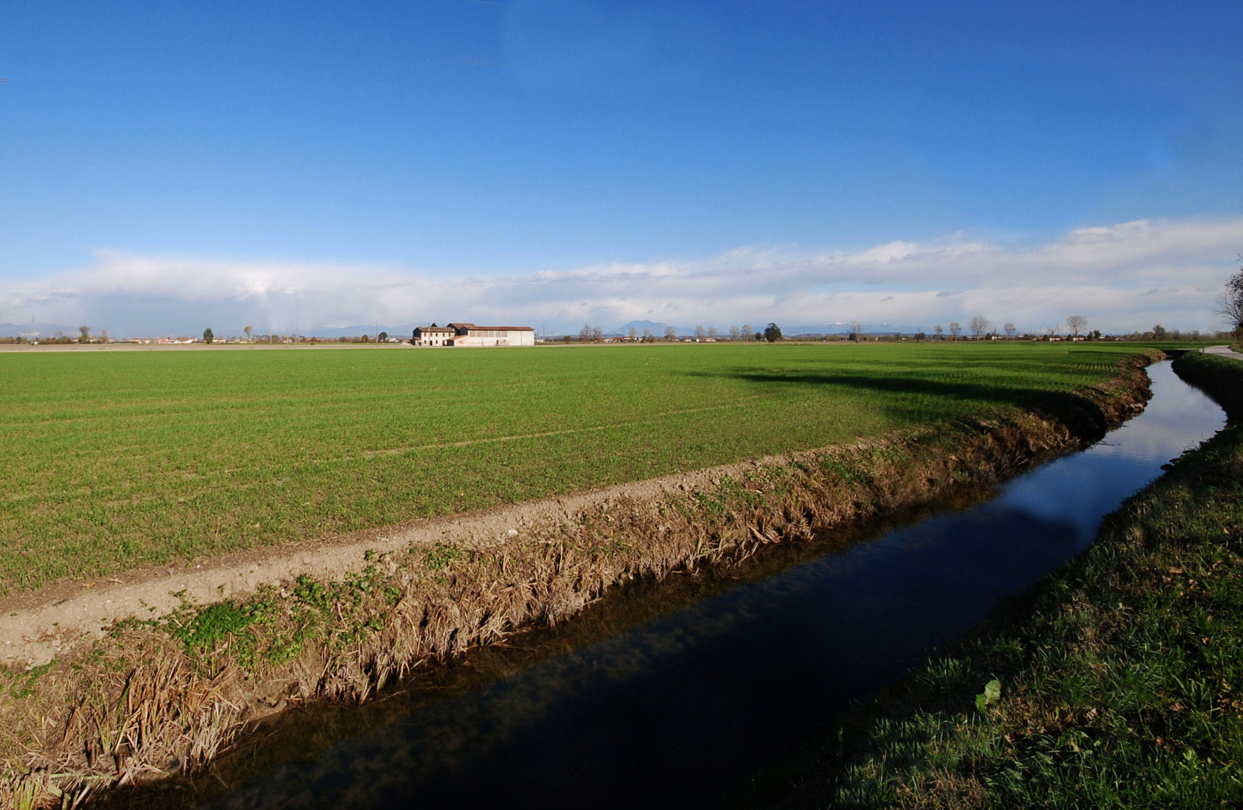 Casaloldo, Torrente Fuga.